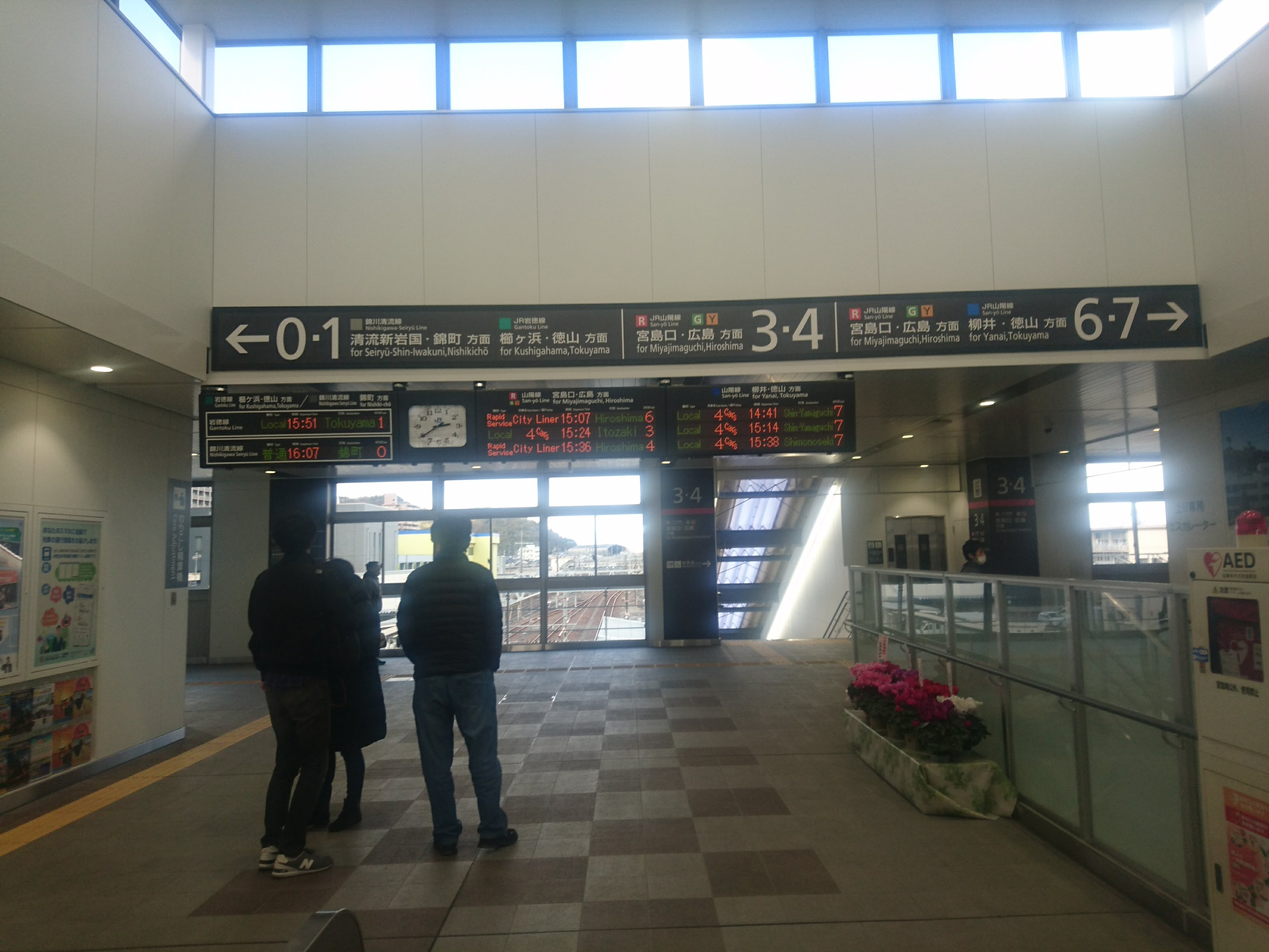 岩国駅改札口